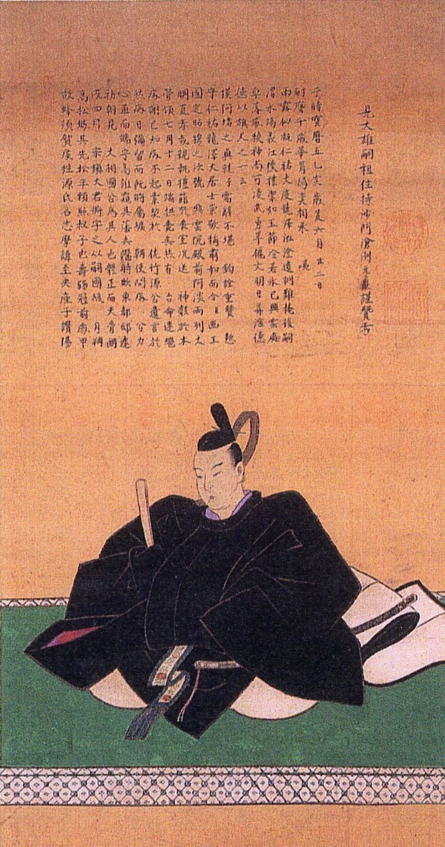 蜂須賀至央の肖像。